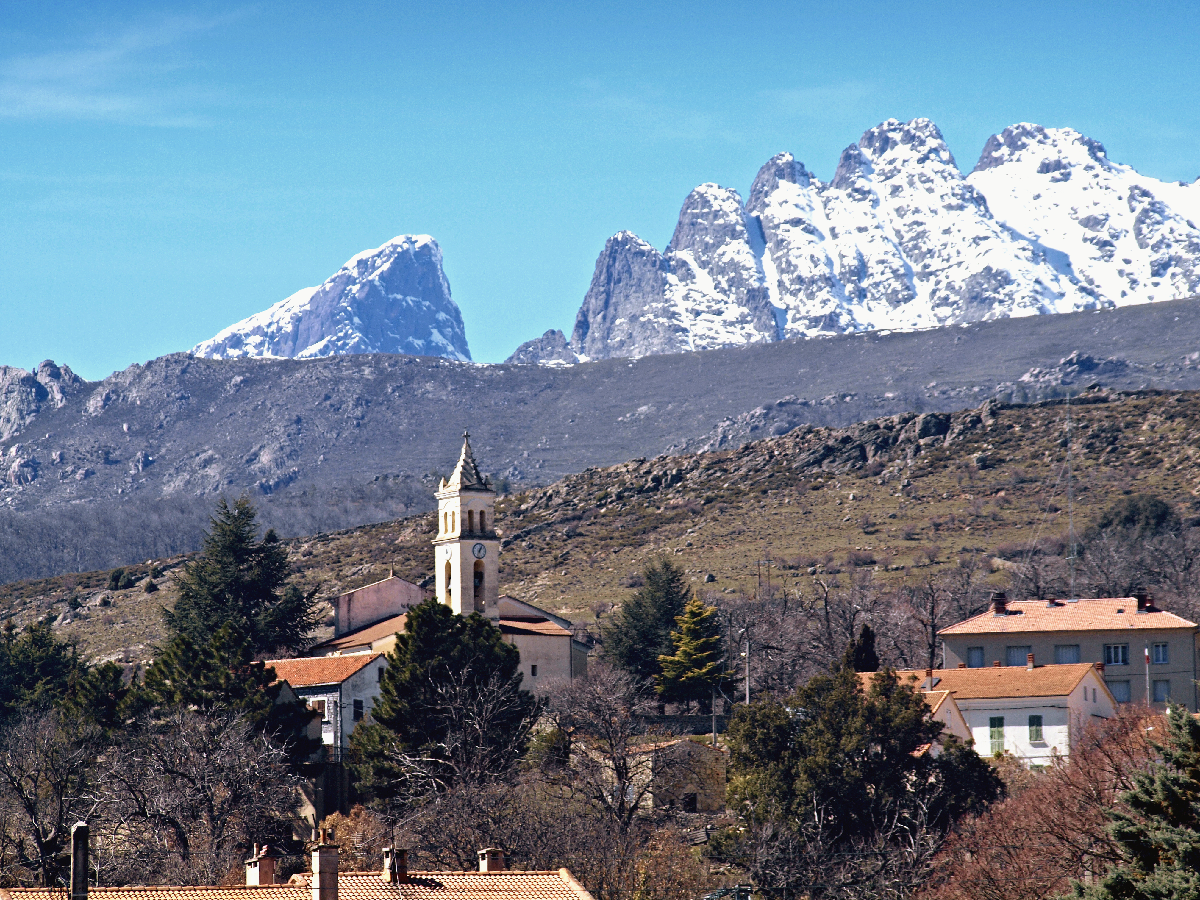 Calacuccia (Corsica) - I Cinque Frati (1986 m)